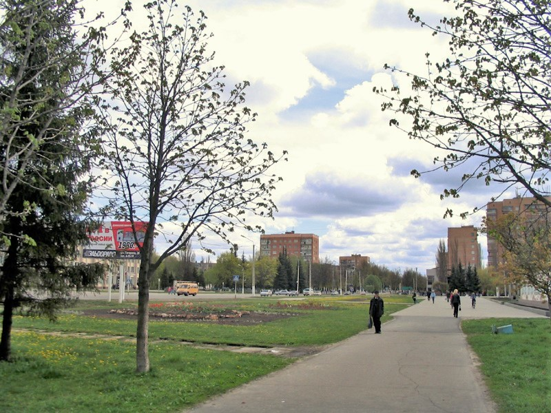 Железногорск.Курская область.